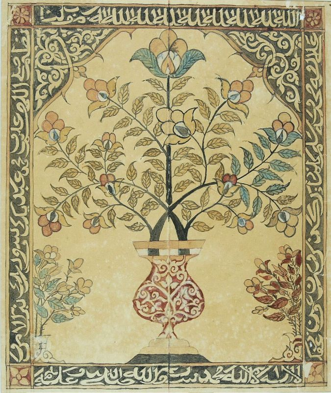 Tekening. Een ingekleurde pentekening, vervaardigd door Teungkoe Soepi (Tjalang, Atjeh).. Een levensboom in een vaas met islamitische religieuze teksten in Arabisch schrift er omheen